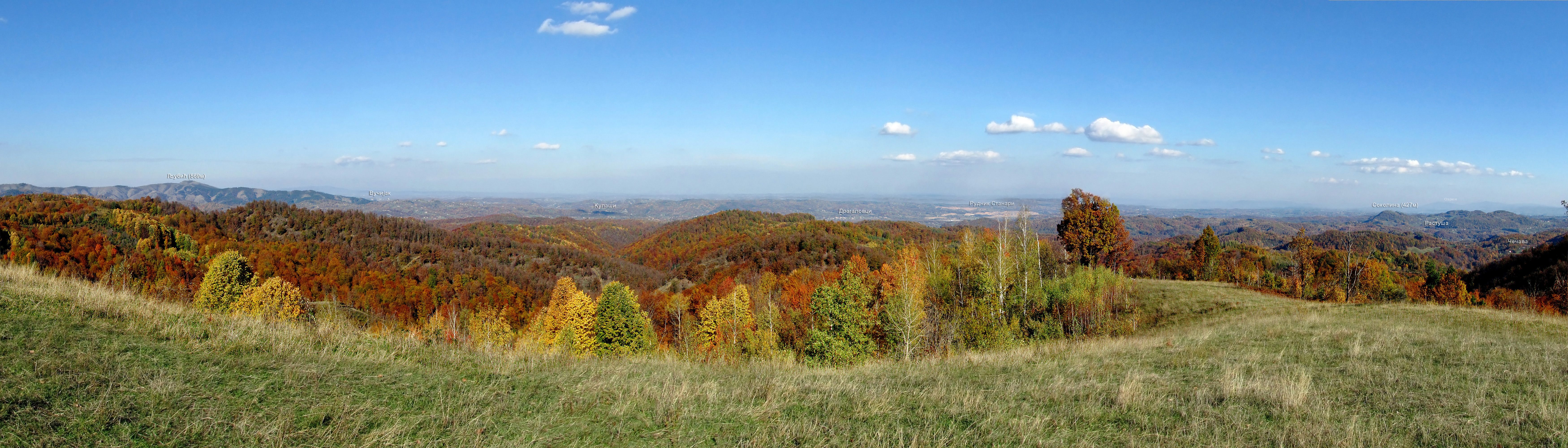 Поглед са Краљичиног брда у правцу сјевер - сјевероисток